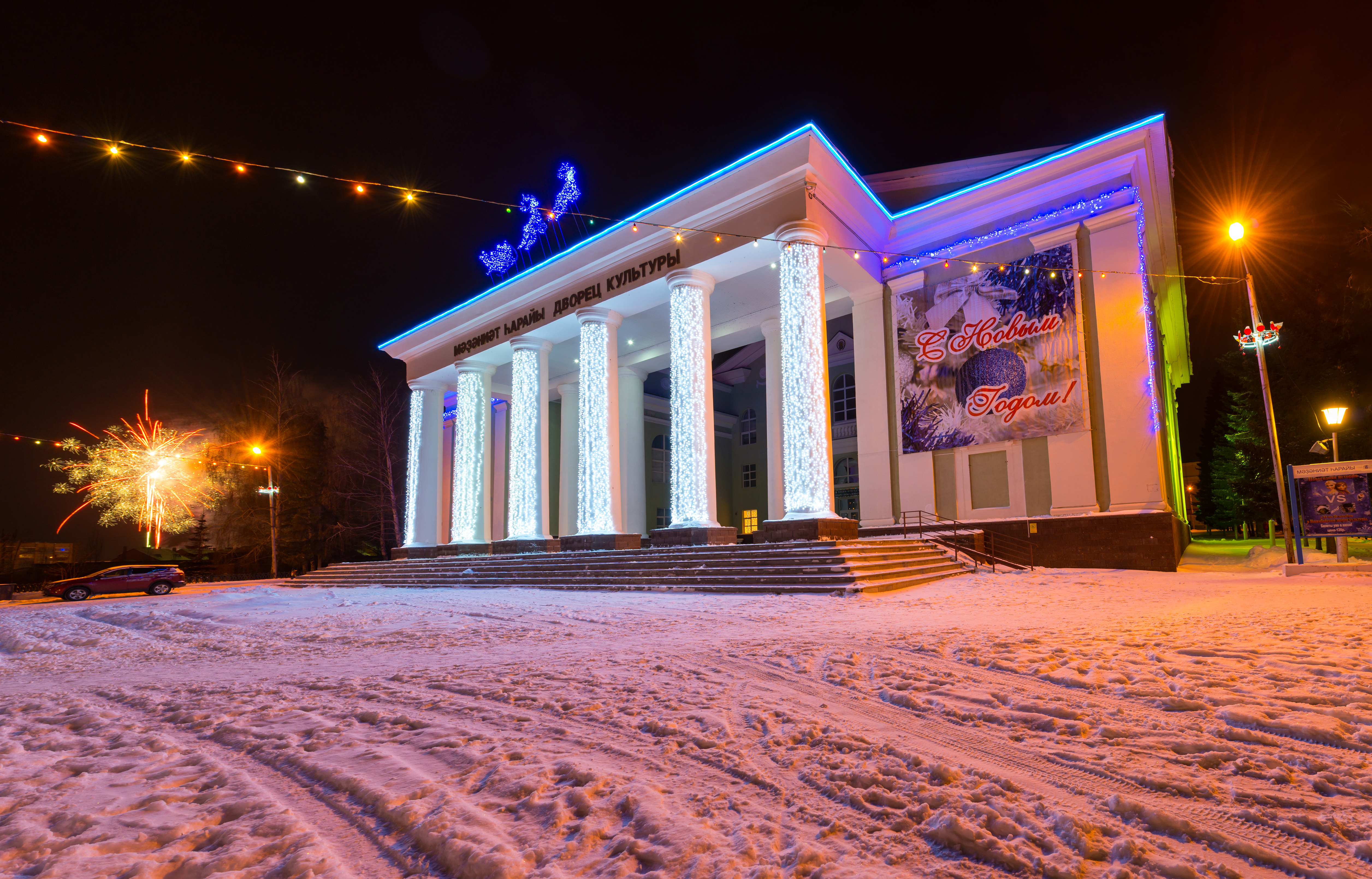 Дом культуры в Ишимбае.